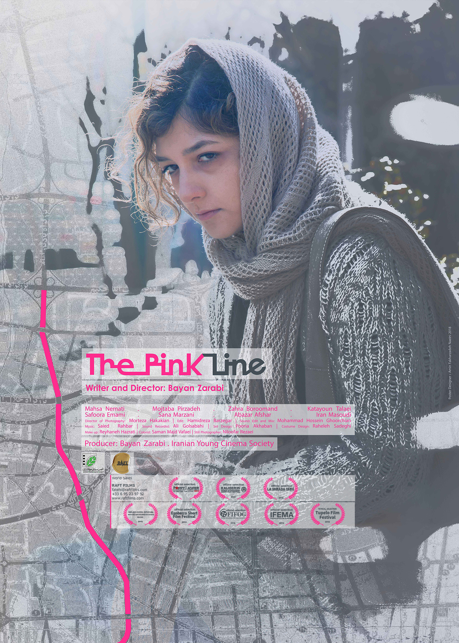 پوستر رسمی فیلم